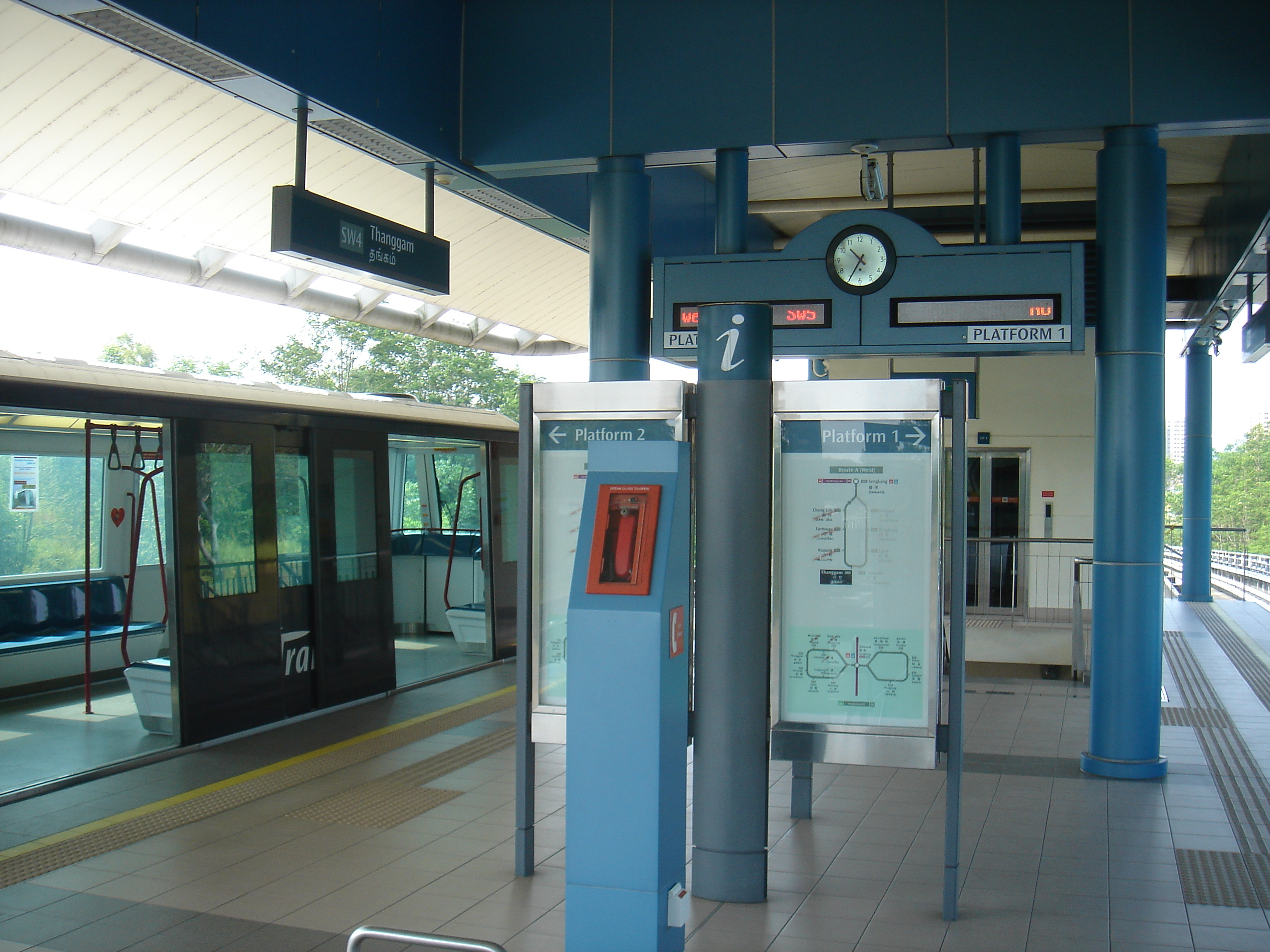 Thanggam LRT Station, Sengkang LRT, Singapore.